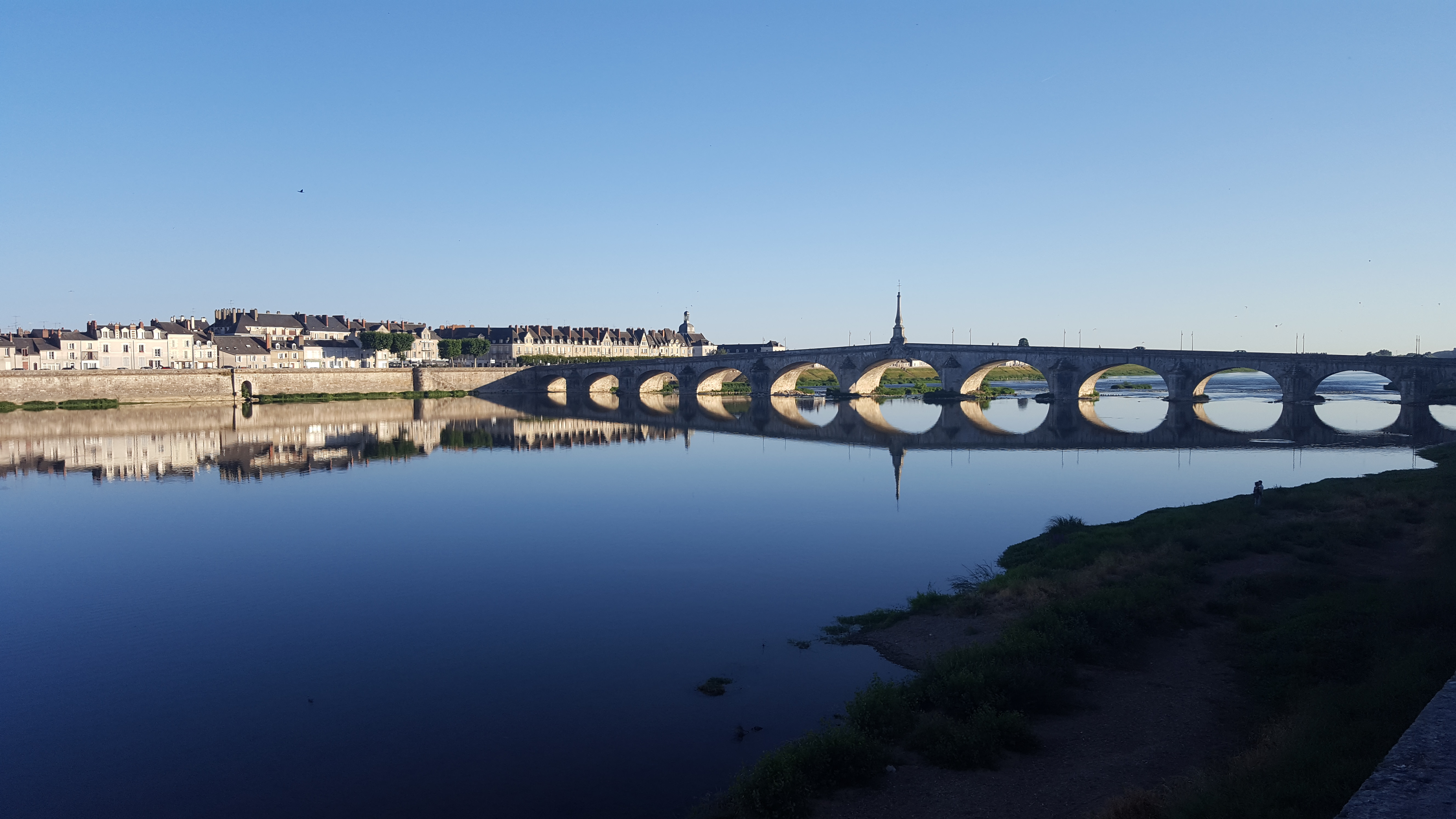 Vue du pont et de la rive gauche de Blois (France)